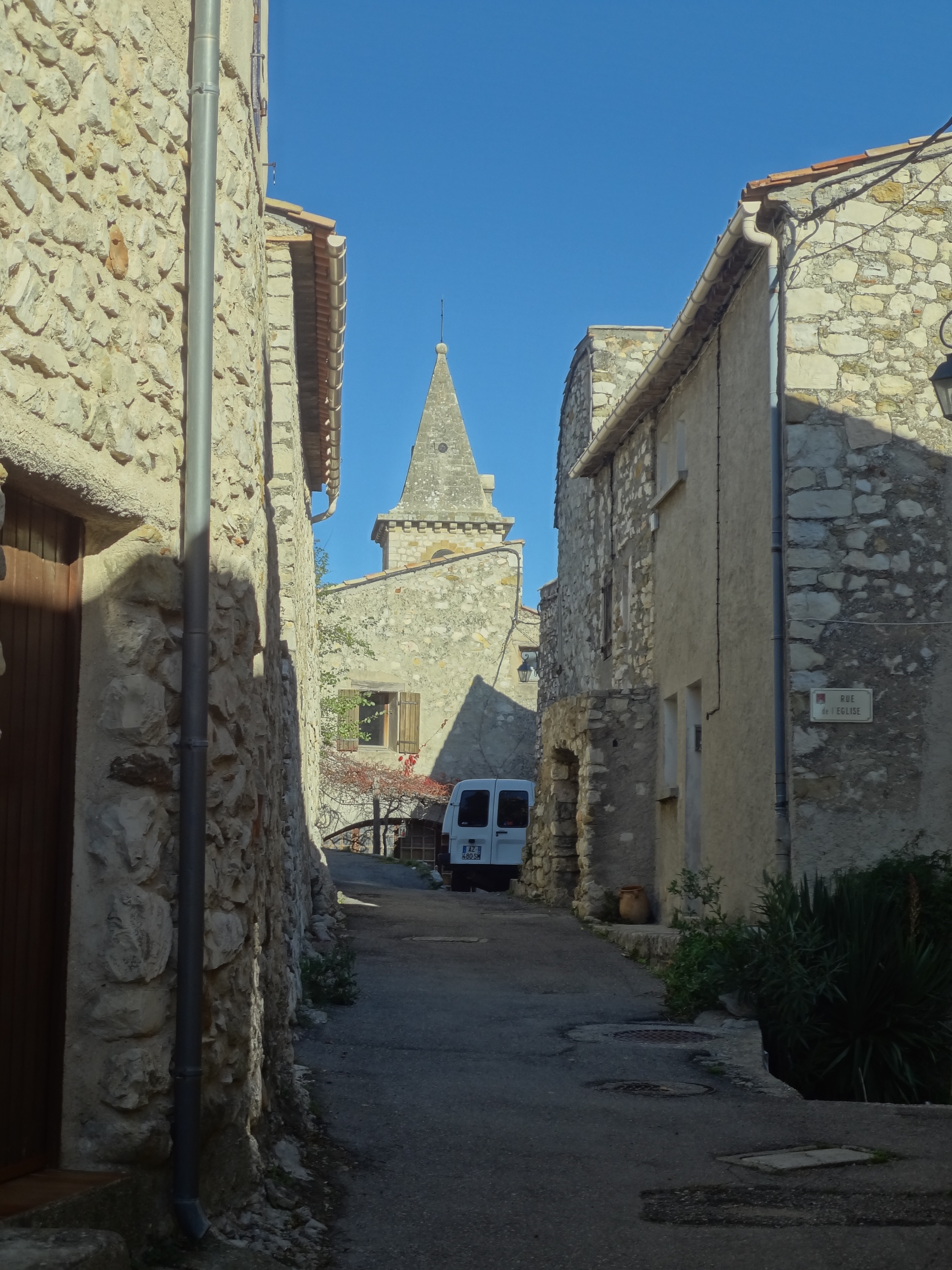 Clocher de l'église Sainte-Madeleine de Montfort (Alpes-de-Haute-Provence)